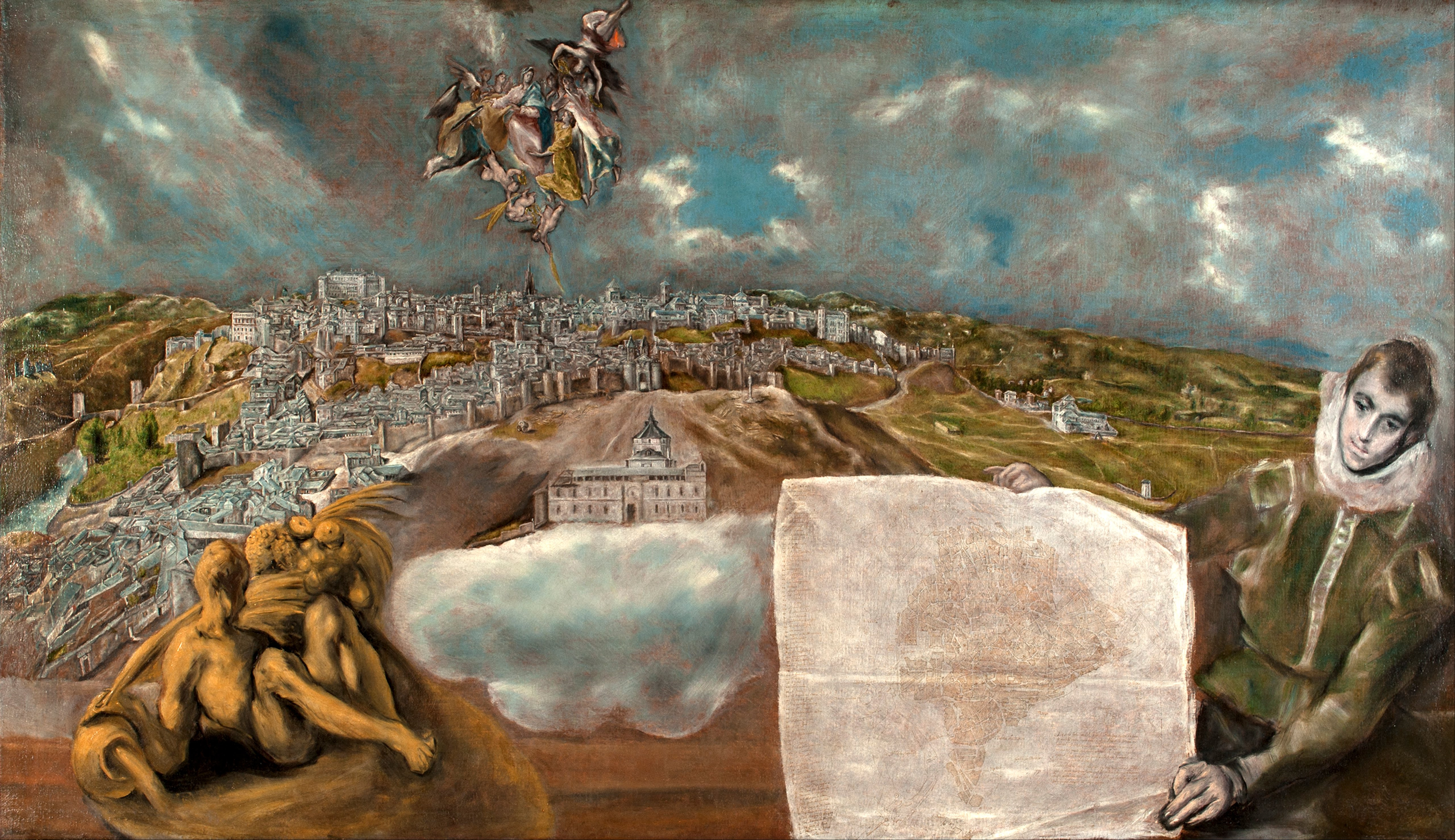 La obra muestra una vista general de la ciudad de Toledo, (España), y con ella El Greco contribuyó a la difusión de la nueva imagen de la ciudad al representar las principales construcciones modernas de aquel momento, que eran el Alcázar, la Puerta Nueva de Bisagra y, sobre todo, el Hospital de Tavera, que predomina sobre todo el conjunto de monumentos. Y al tiempo El Greco soslayó la presencia de la catedral de Toledo y del monasterio de San Juan de los Reyes, que eran los edificios medievales más destacados de la antigua capital del reino visigodo de Toledo.